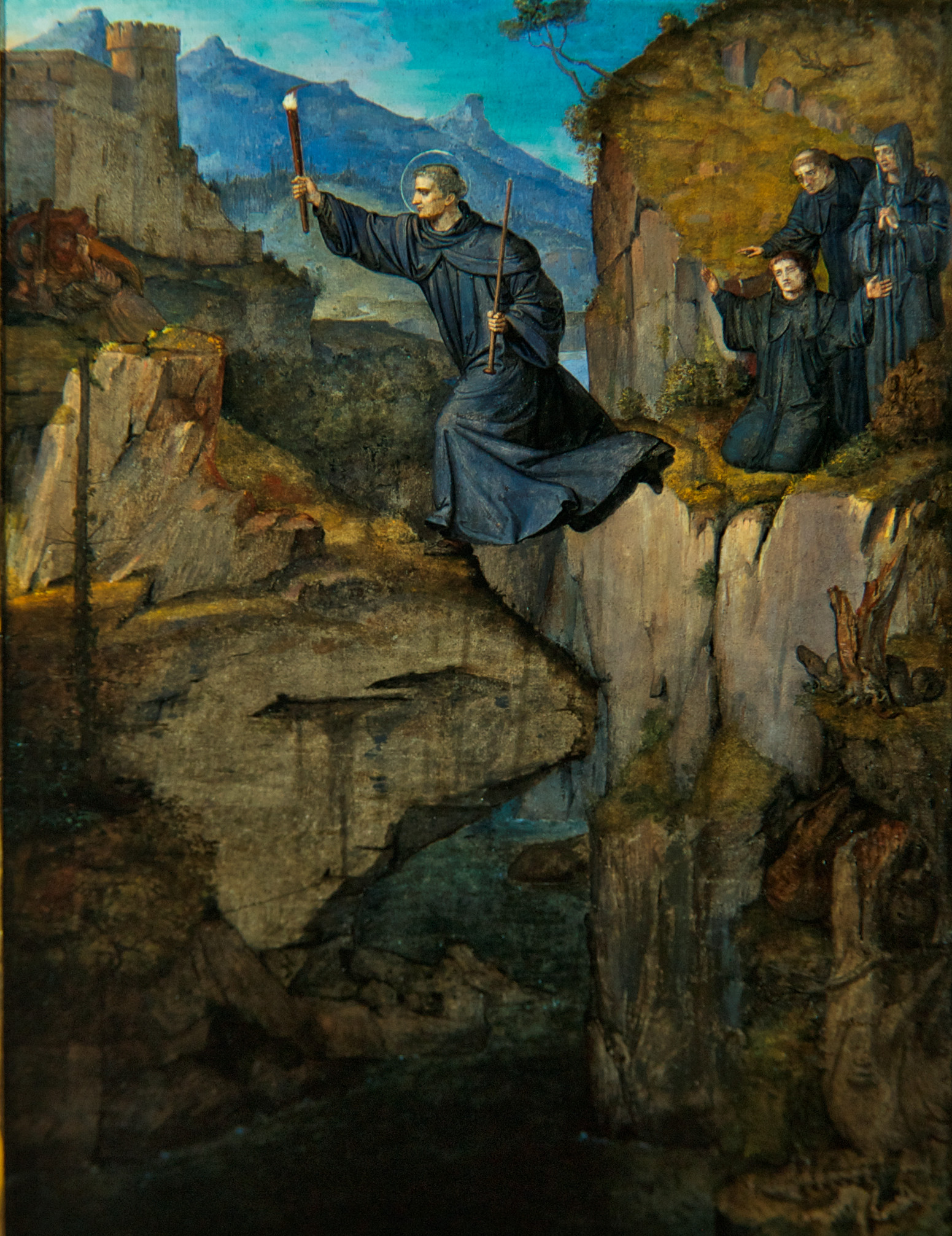 Magnussprung